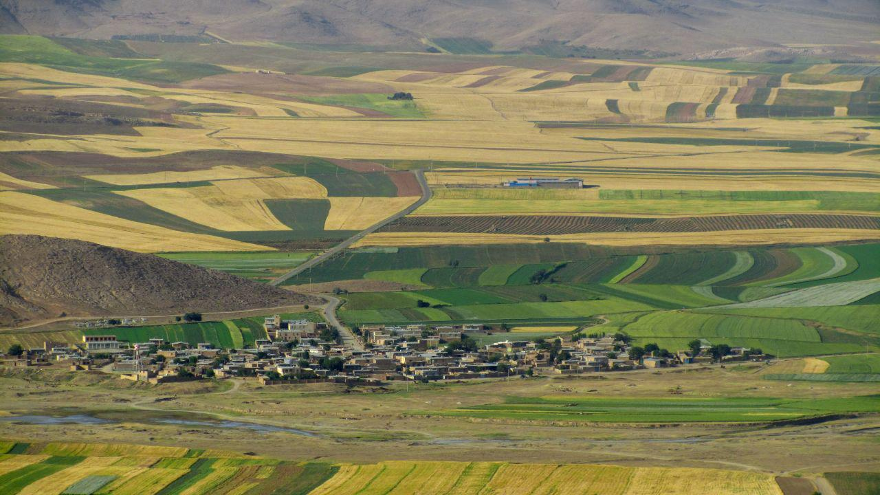 روستای گردیان